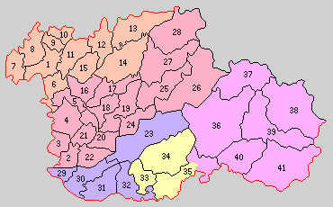 愛知県東春日井郡の町村制時点の町村。